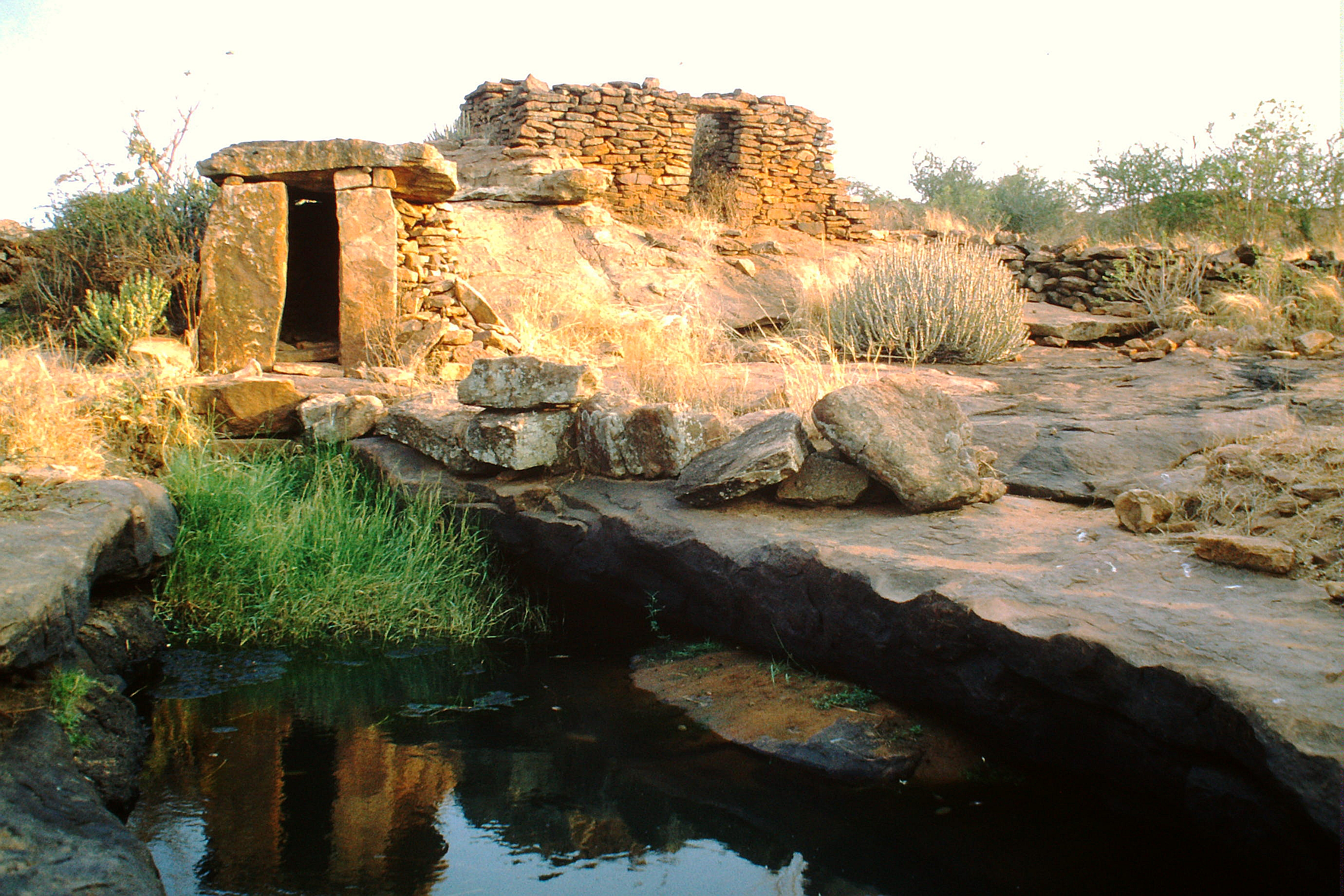 Badami, Dolmen-Tempel